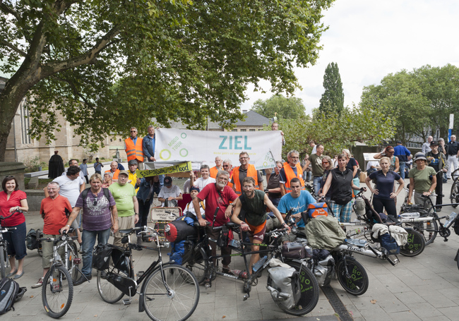 Teilnehmer der ersten Mood-Tour